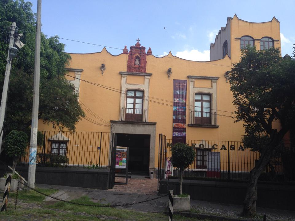 Foto de la Fachada de la casa Risco, San Ángel CDMX